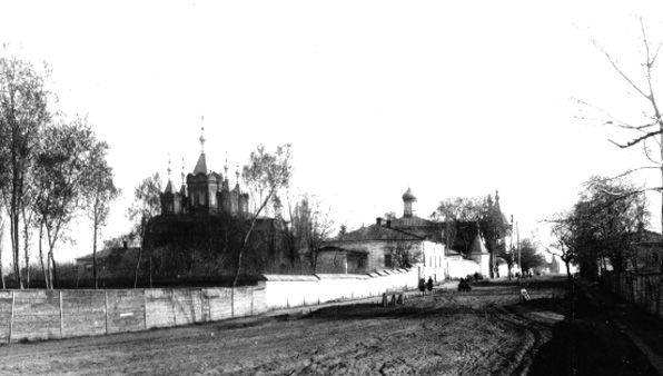 Monastry in Starobilsk, Ukraine